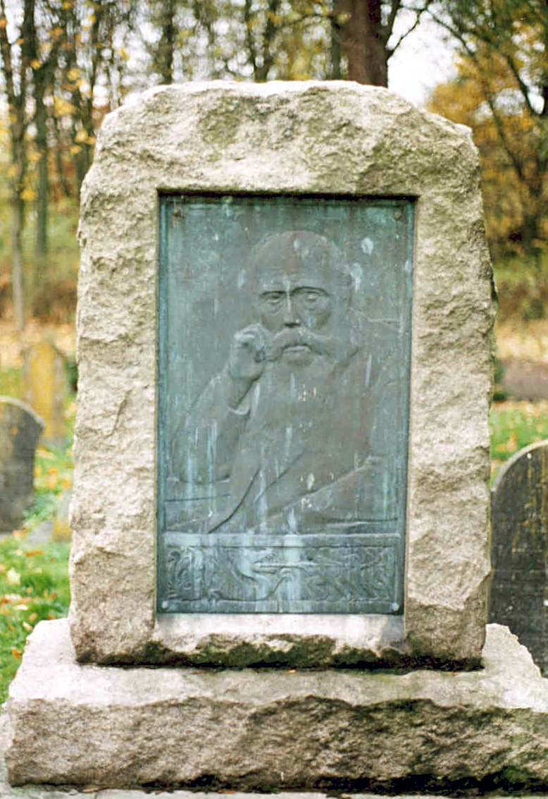 Tjipke Visser (1876-1955), 1923